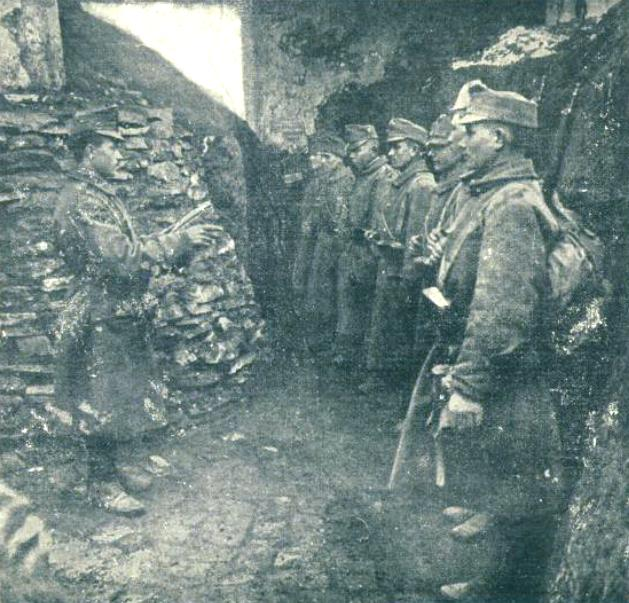 Zamenjane čete ob prihodu v strelski jarek.